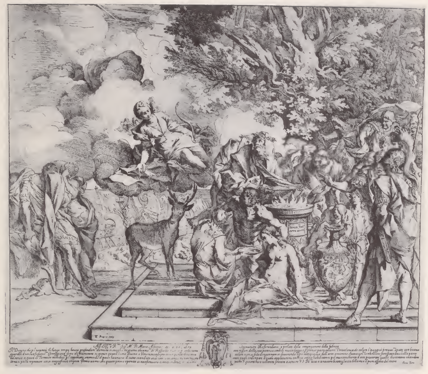 Sacrificio di Ifegenia